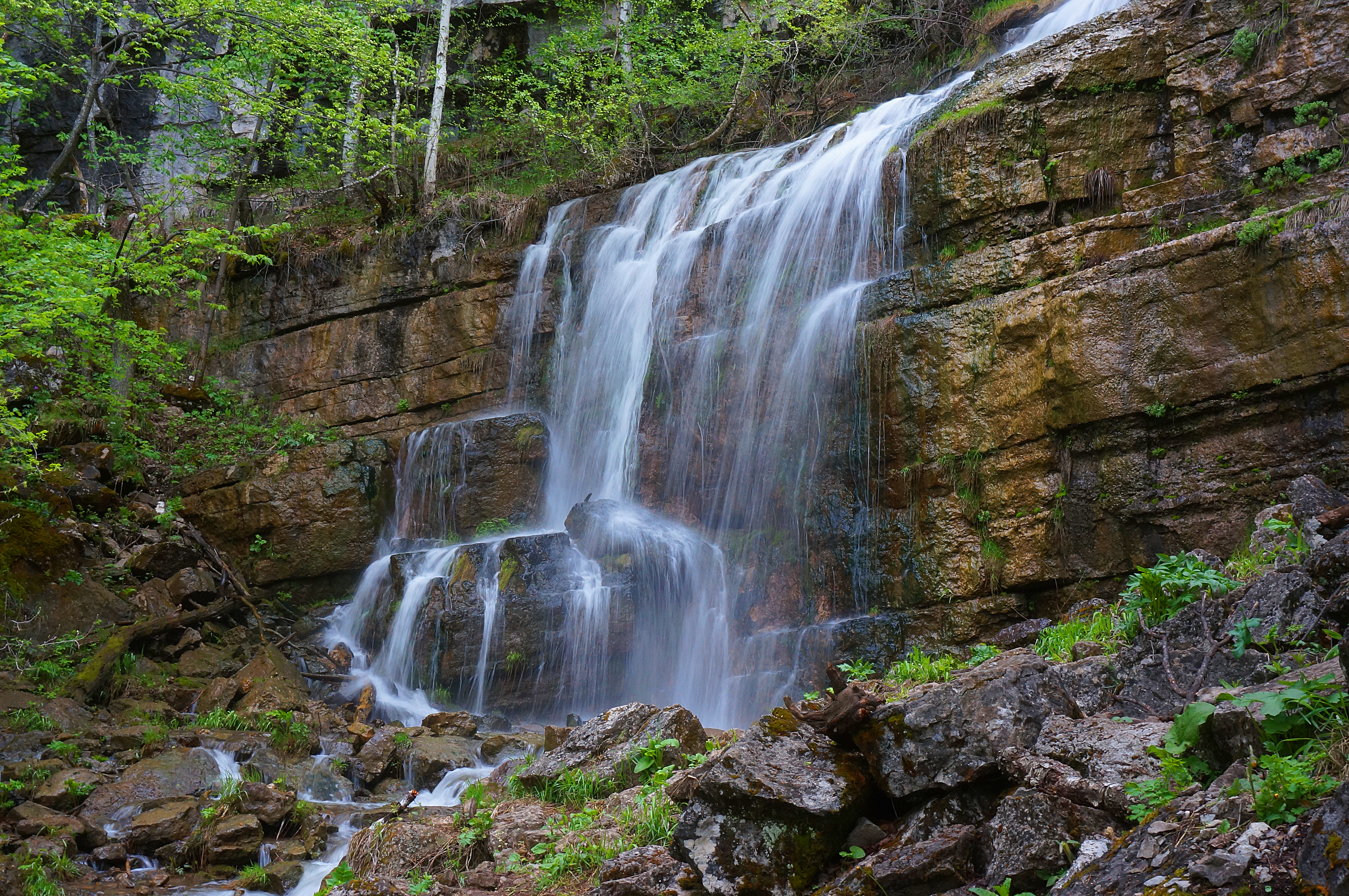 Башкирия: Национальный парк расположен на юго-западных склонах Южного Урала, к западу от водораздельного хребта Уралтау, в юго-восточной части Башкирии,Бурзянский район, Башкортостан This image is related to the protected area of Russia number 0200098